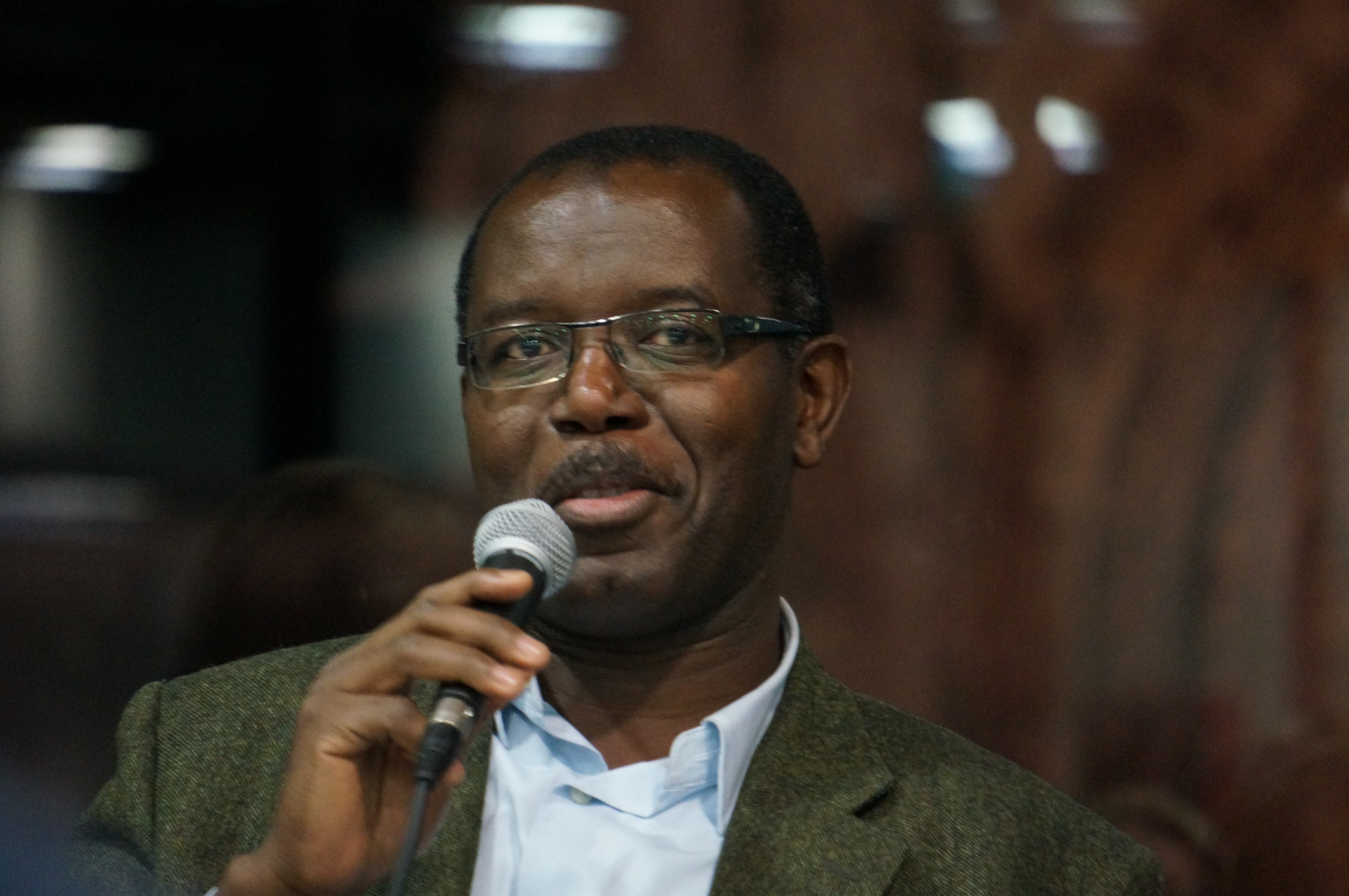 Louis-Philippe Dalembert parlant de poésie.